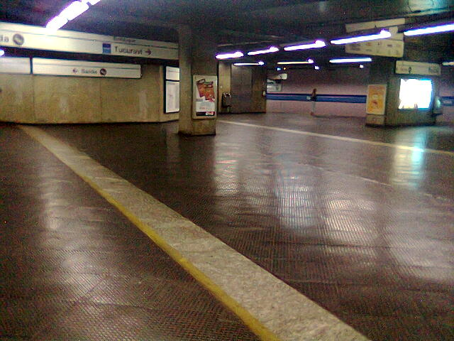 Foto externa do Ramal Moema do Metrô de São Paulo, estação Paraíso. Foto tirada por mim pelo celular.